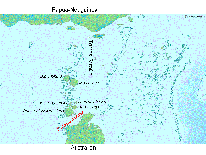 Endeavour Straße